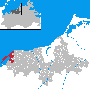 Rerik in Mecklenburg-Western Pomerania - District Bad Doberan